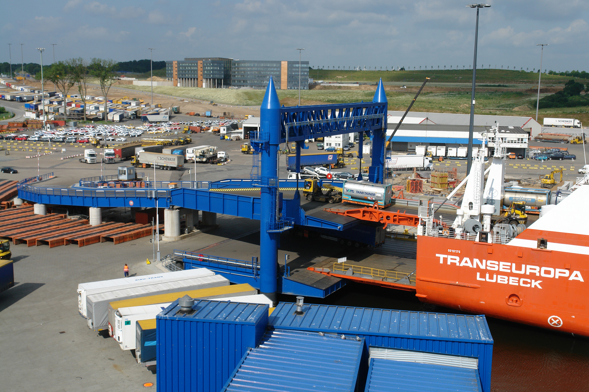 Fährhafen Travemünde